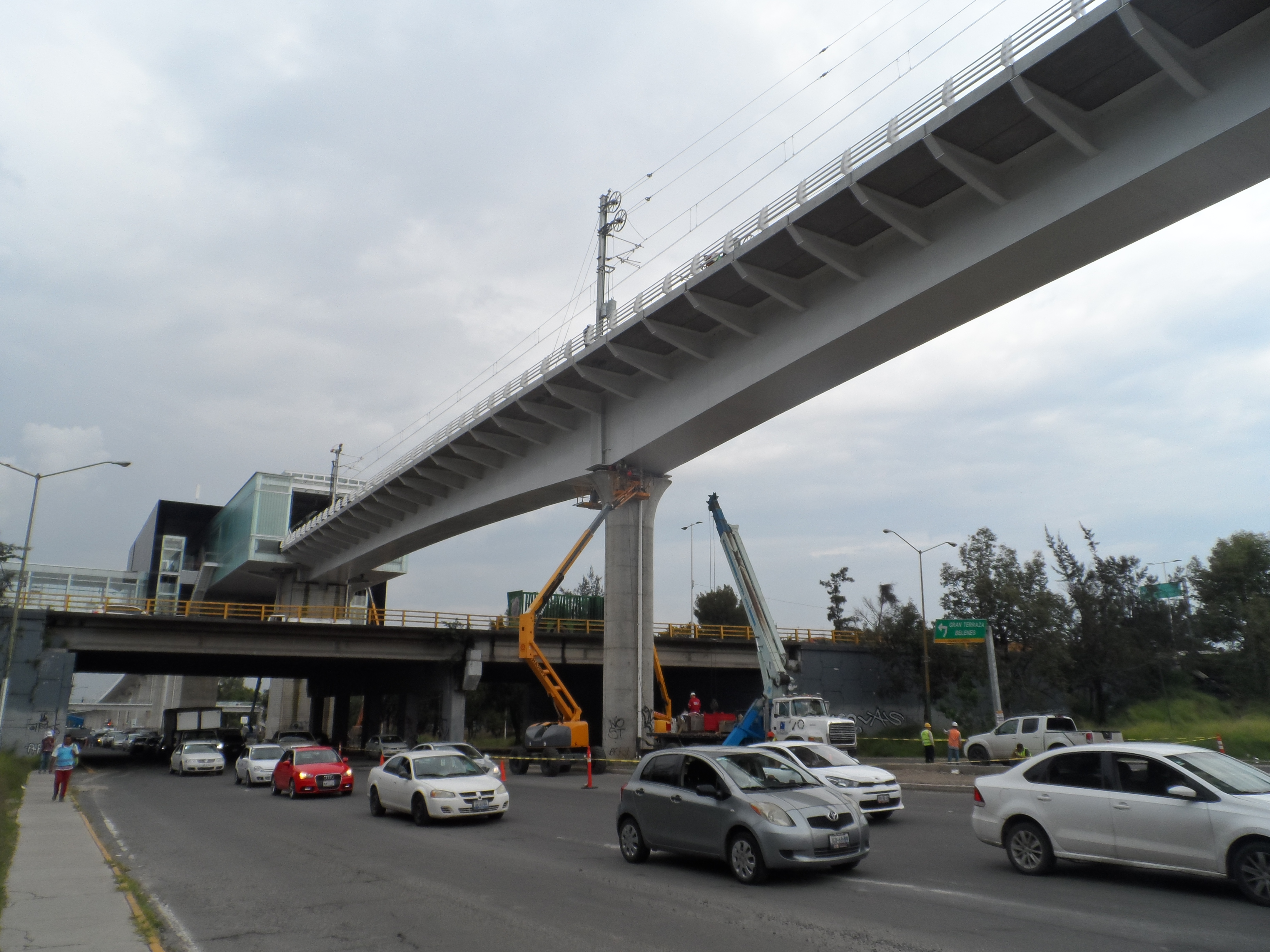 El Viaducto 1 de la Línea 3 del Tren Ligero de Guadalajara sobre el Anillo Periférico Norponiente, a unos metros de la estación Belenes de dicha línea.